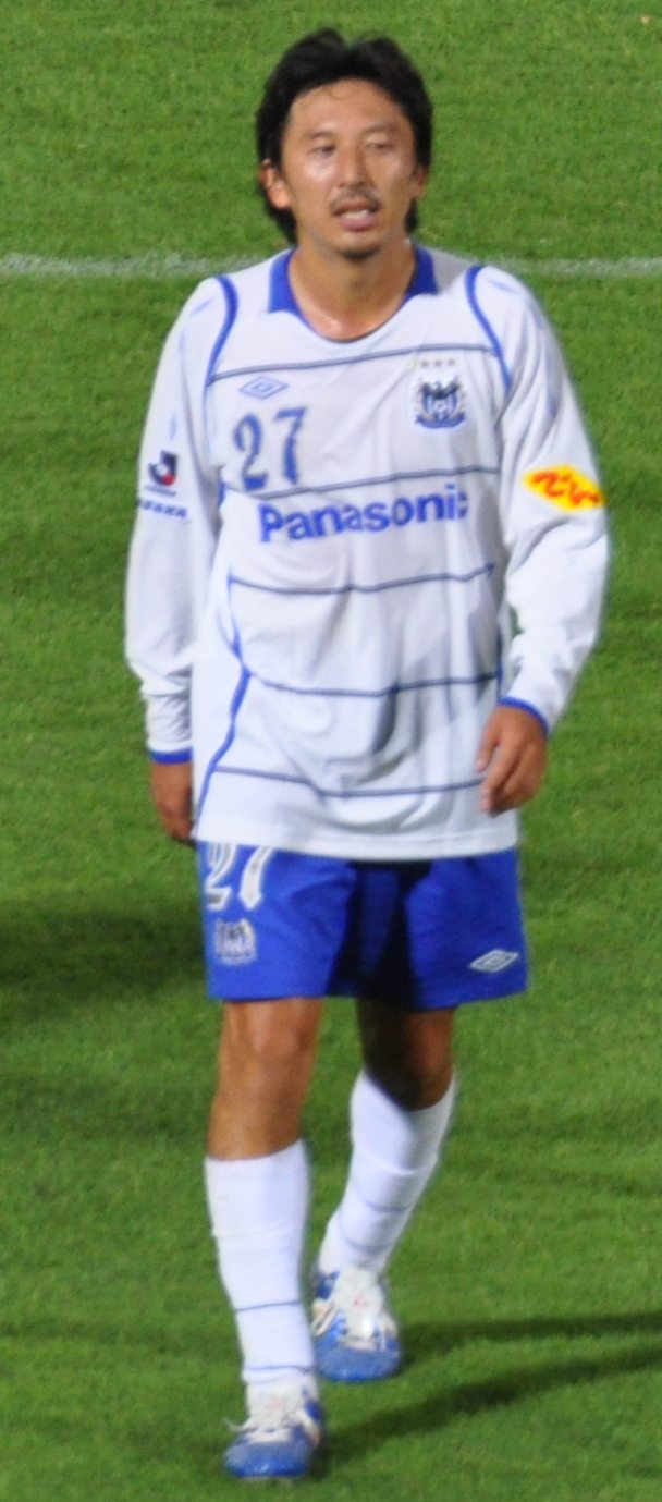 Kawasaki Frontale vs Gamba Osaka_442